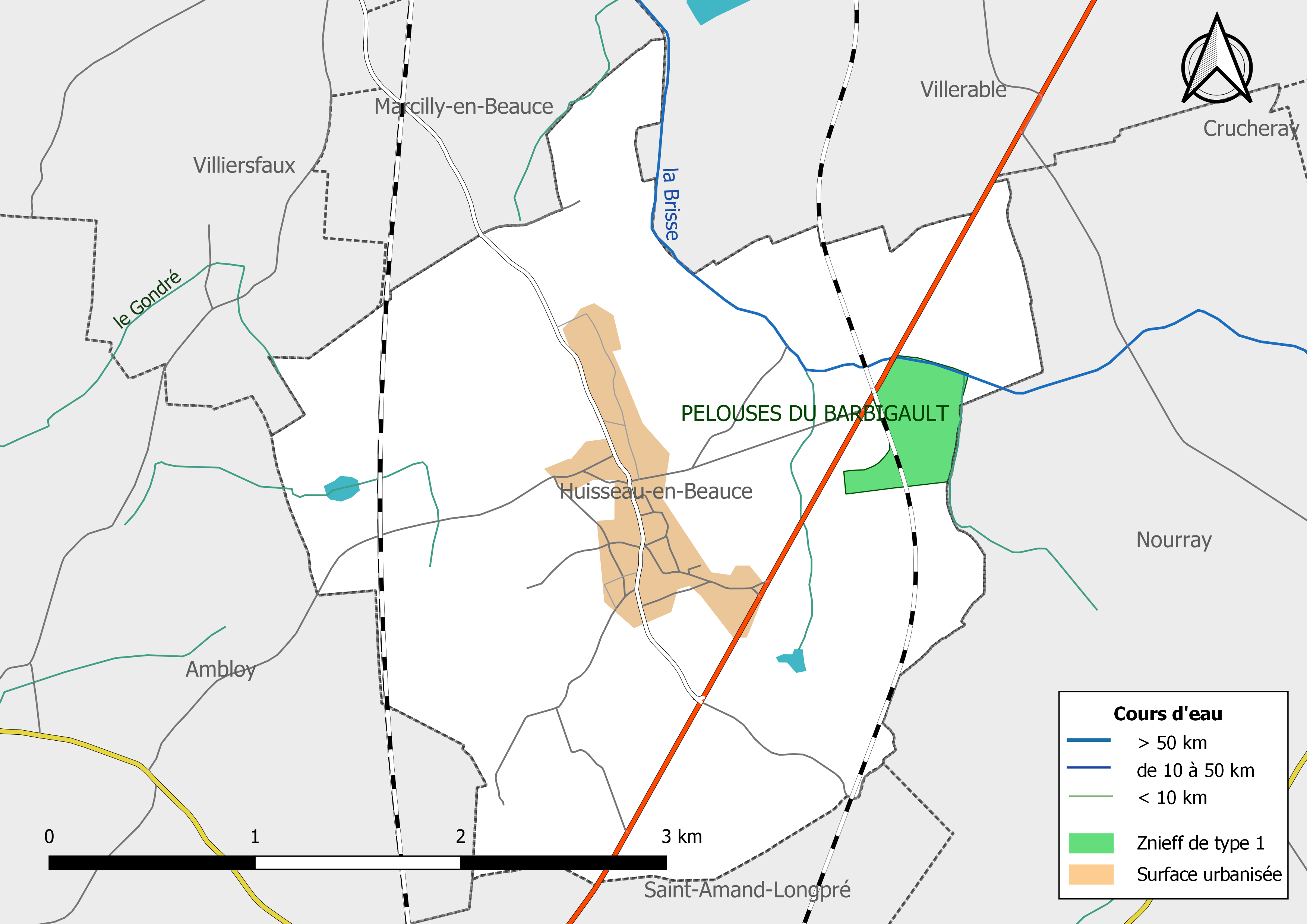 Zones naturelles d'intérêt écologique faunistique et Floristique (ZNIEFF) de type 1 de la commune de Huisseau-en-Beauce. (Loir-et-Cher, France).